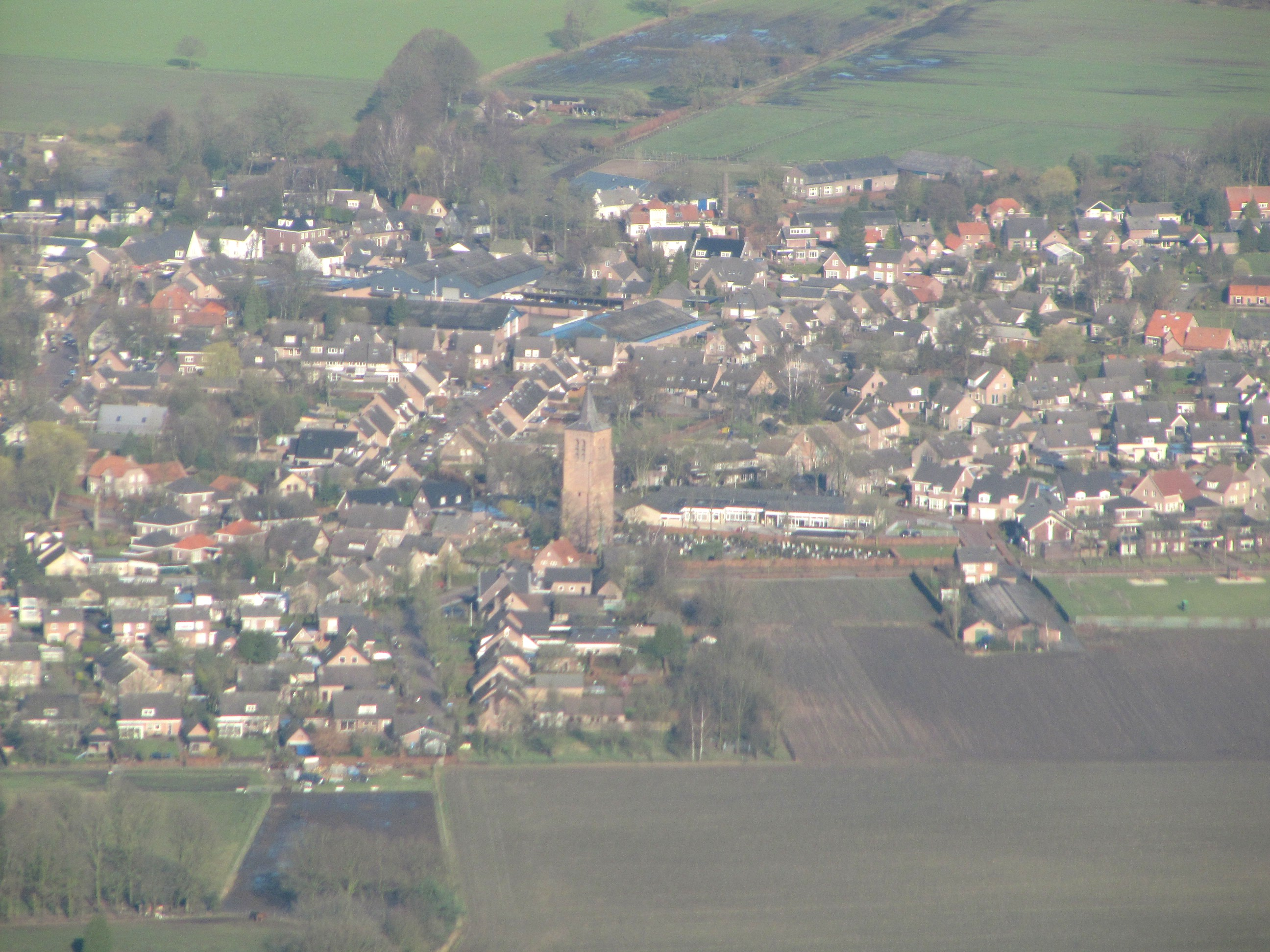 Hoogeloon